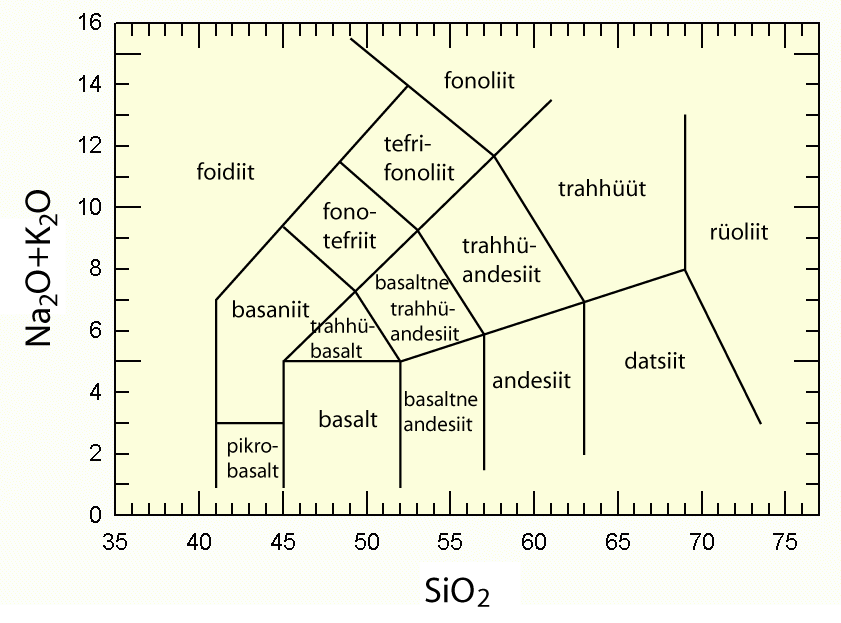 TAS-diagramm